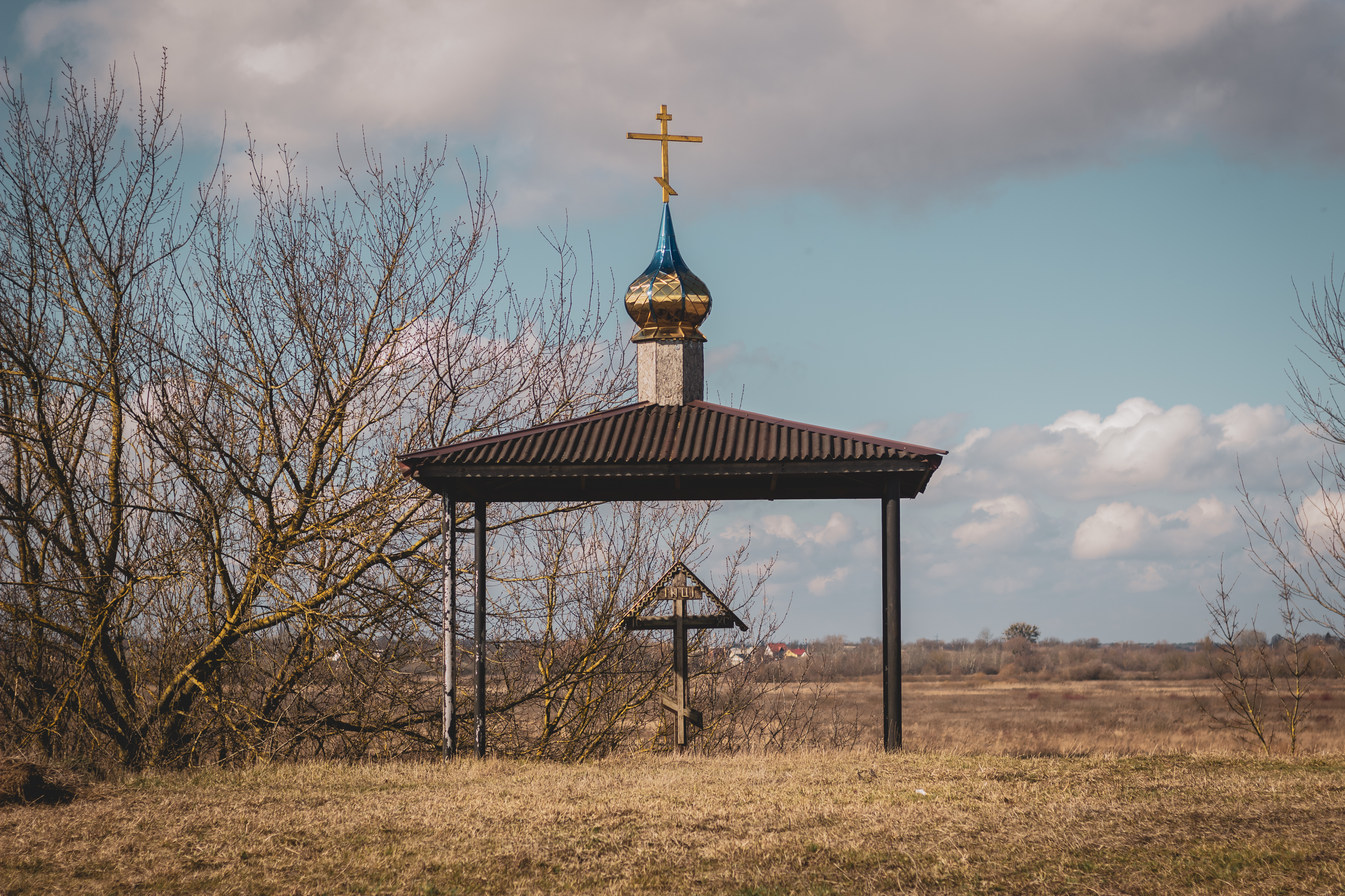 Літня каплиця